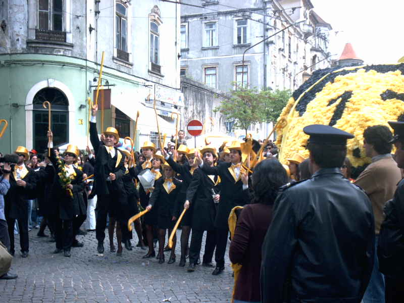 Celebración de la Queima das Fitas en Coimbra.